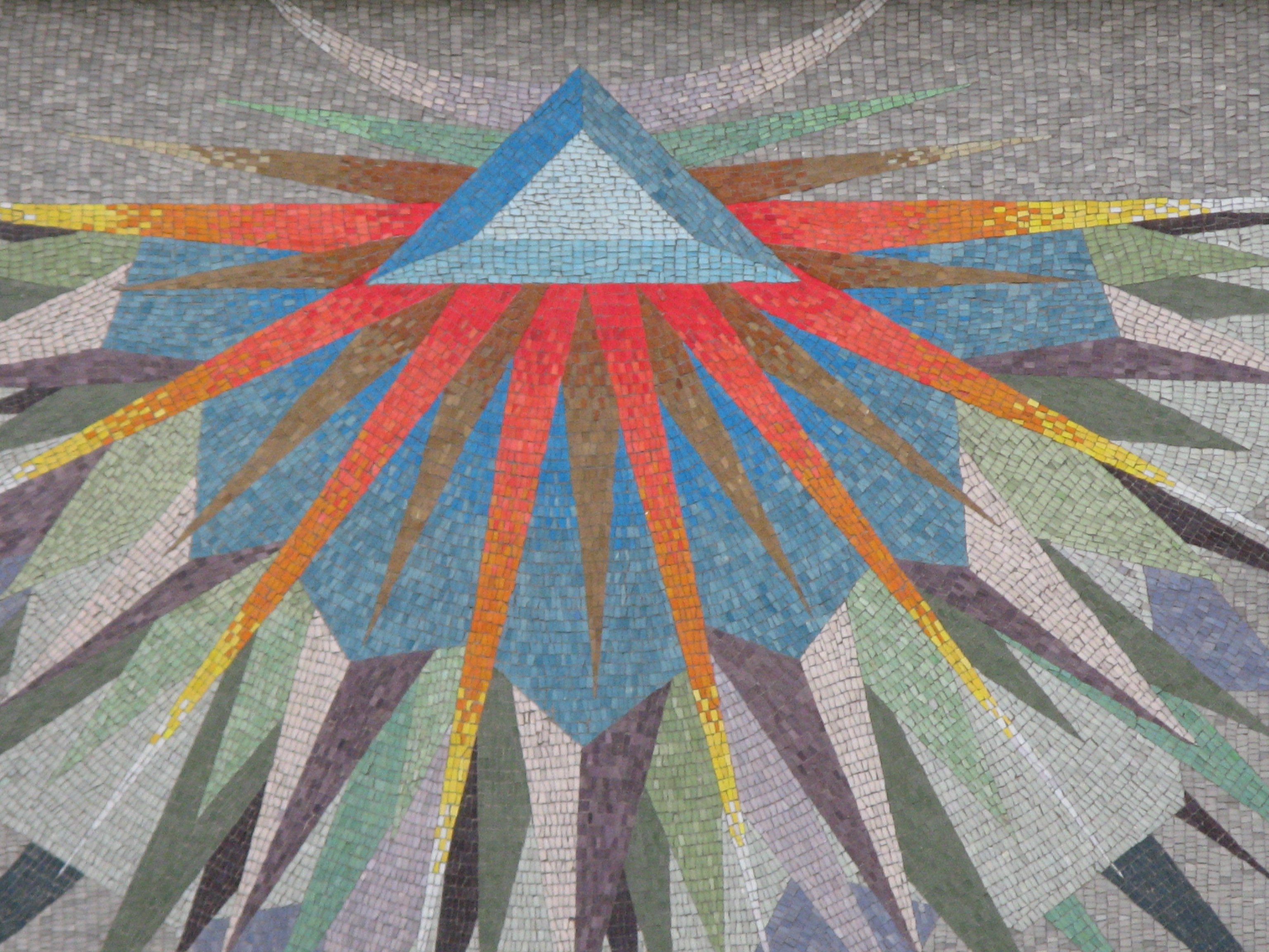 Gott Vater, Mosaik, Wiedner Hauptstraße 14, Wien-Wieden